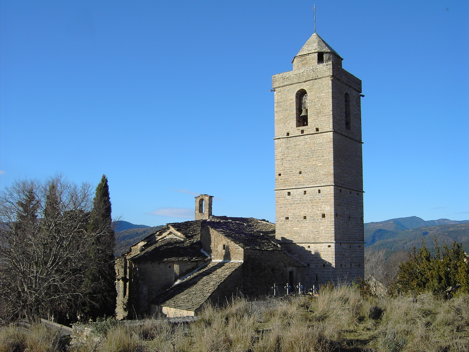 La iglesia de Guaso, perteneciente al municipio de Aínsa-Sobrarbe, en Huesca.